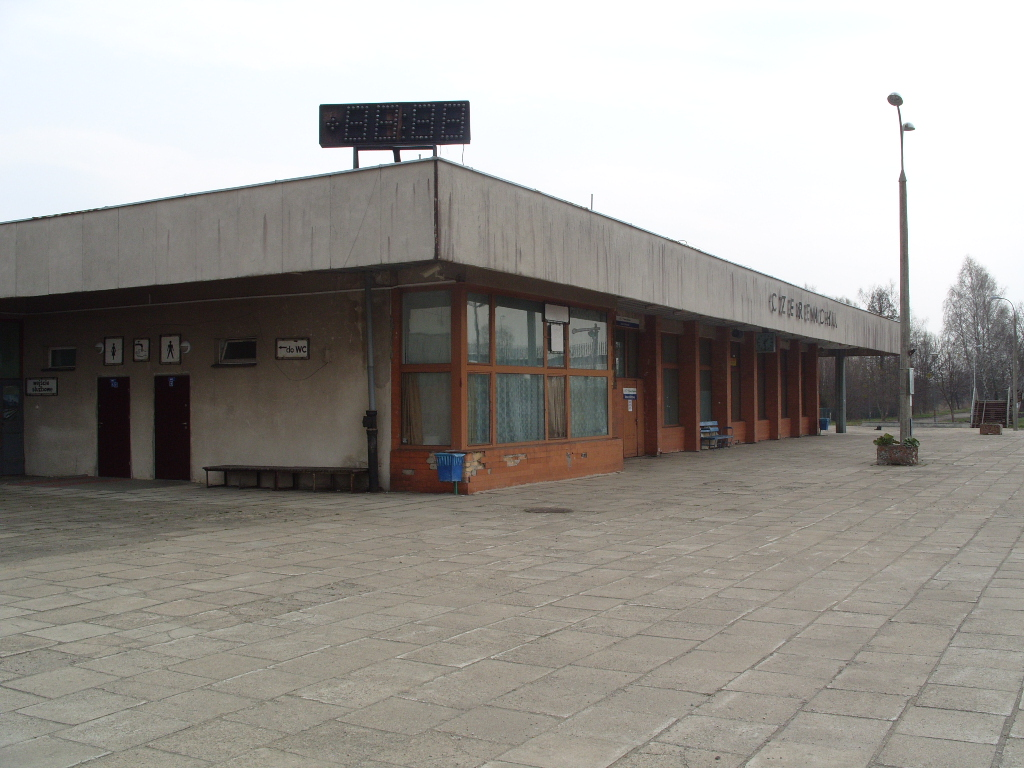 peron nr 1